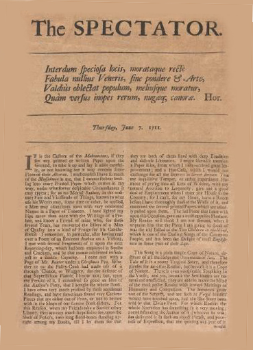 Spectator